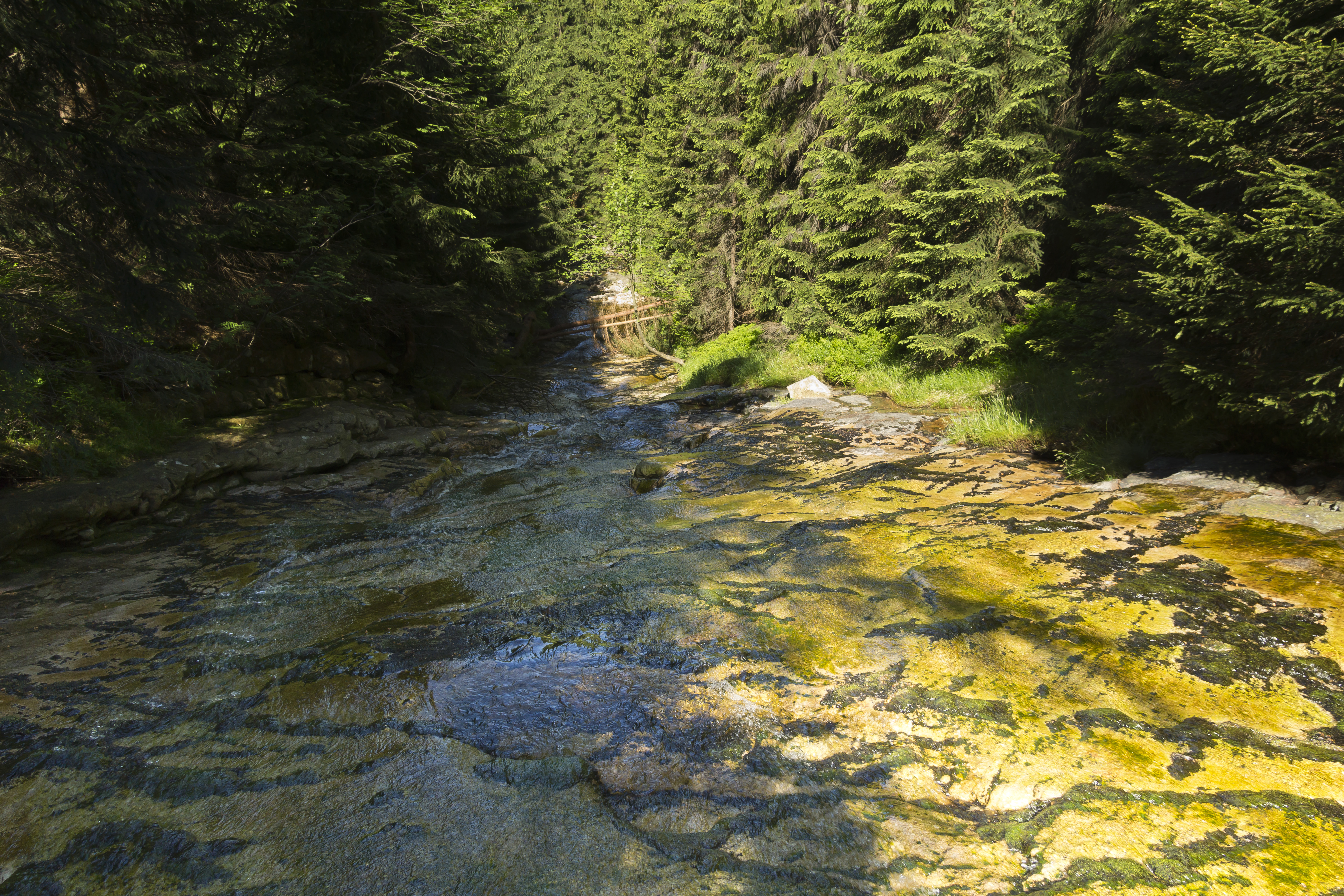 Vodopád na potoce Kamenice (Plochý vodopád)